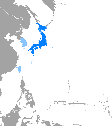 Idioma japonés Donde es mayoritario y oficial Donde el japonés comparte uso con otras lenguas propias